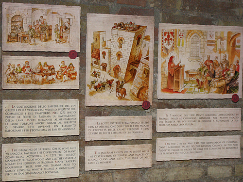 Testimoni del Tempo, Acquerelli realizzati da Enrico Guerrini